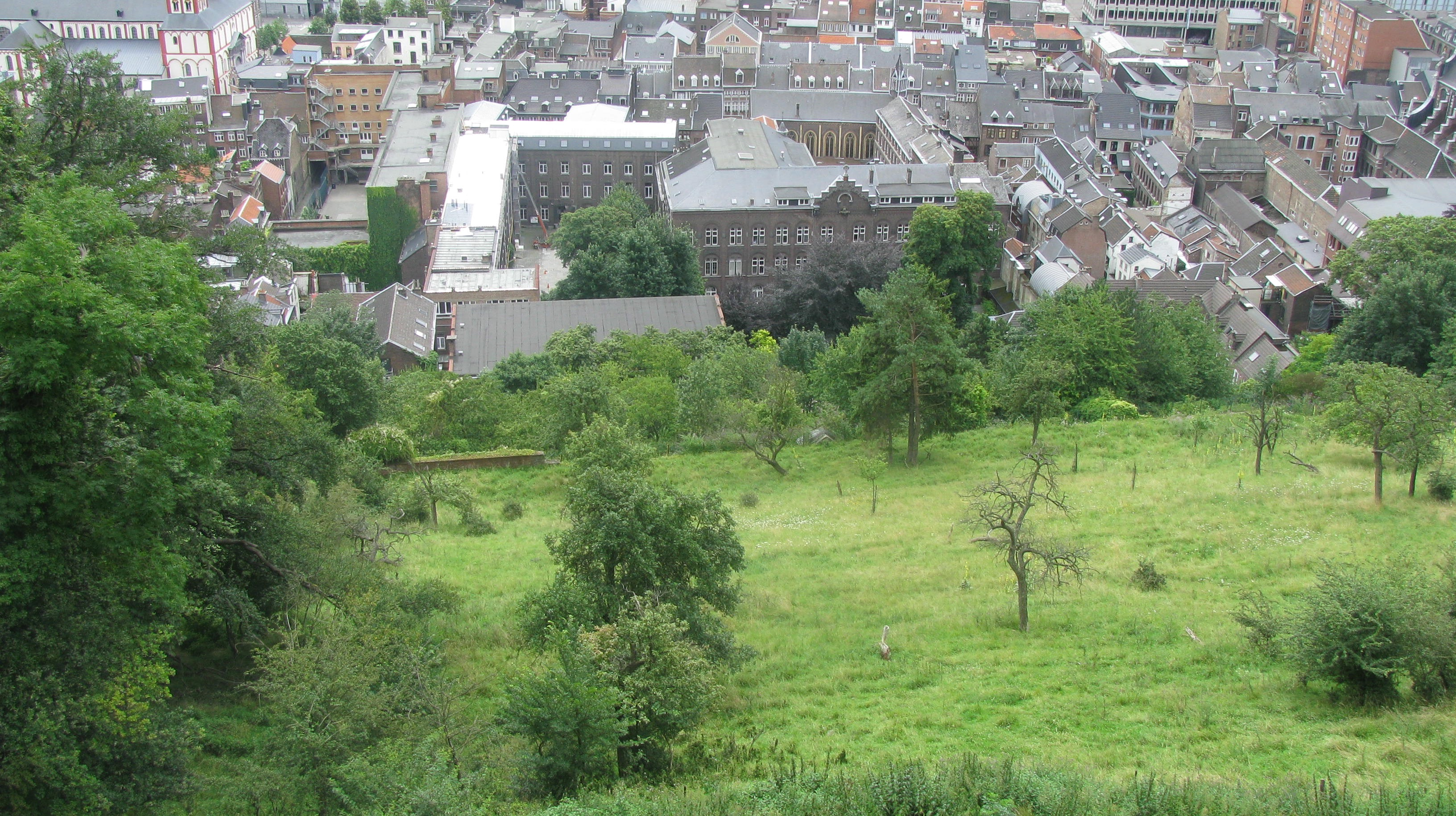 Vue des coteaux de la Citadelle (du bois des Carmélites) vers la prairie des Filles de la Croix à Liège en Belgique